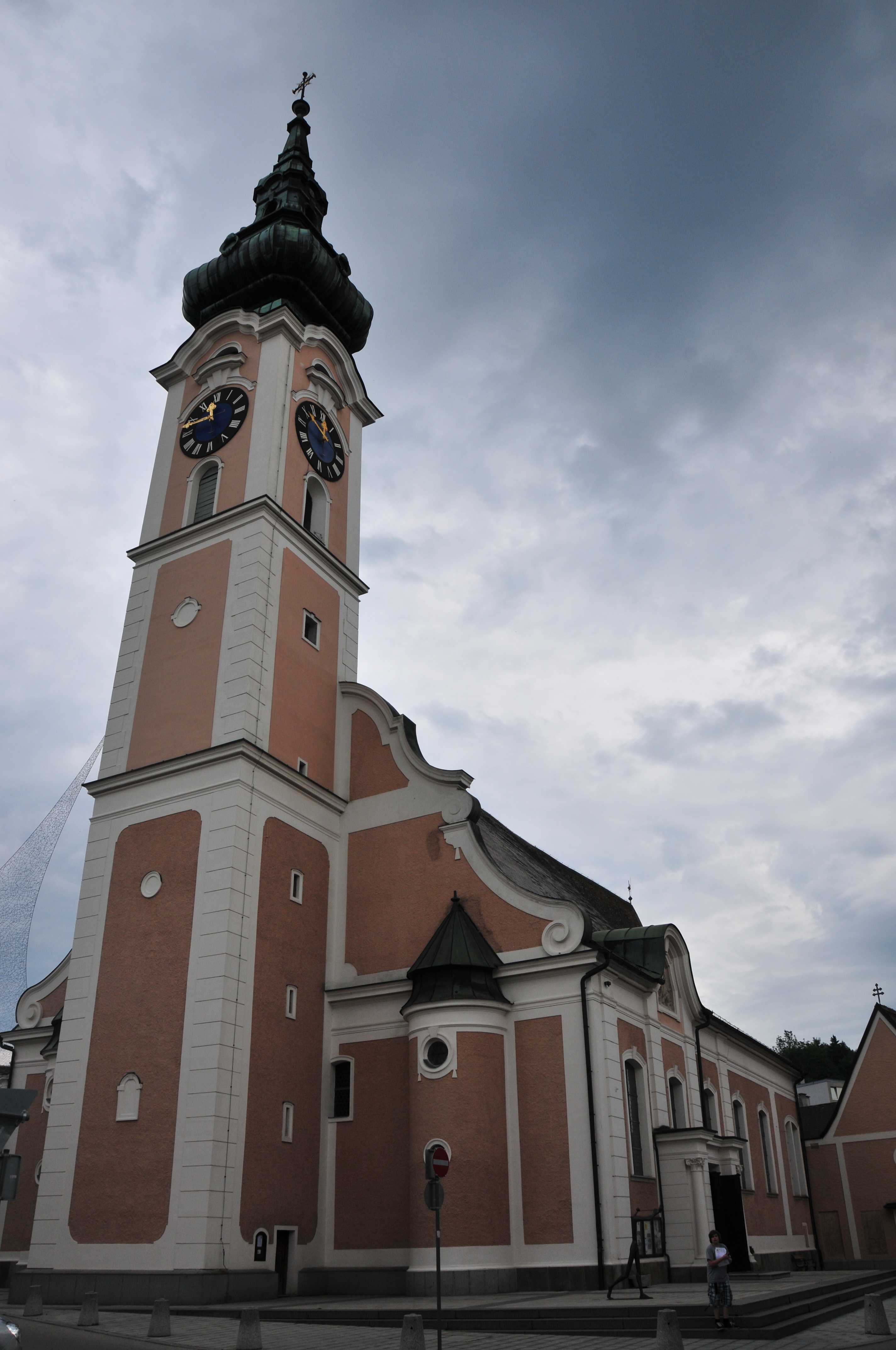 Kath. Pfarrkirche hl. Martin